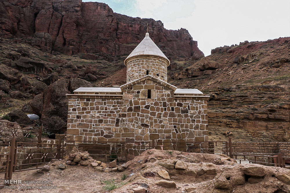 کلیسای آندره ورتی مقدس